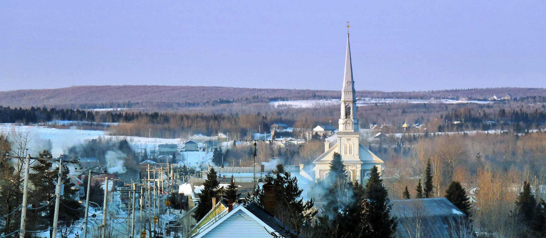 Village de Saint-Hubert-de-Rivière-du-Loup au Bas-Saint-Laurent (Québec) , vu vers l'ouest à partir du chemin Taché.